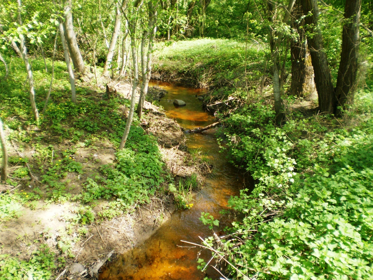 Šventas Brastos upelis Šventybrastyje, Kėdainių raj.